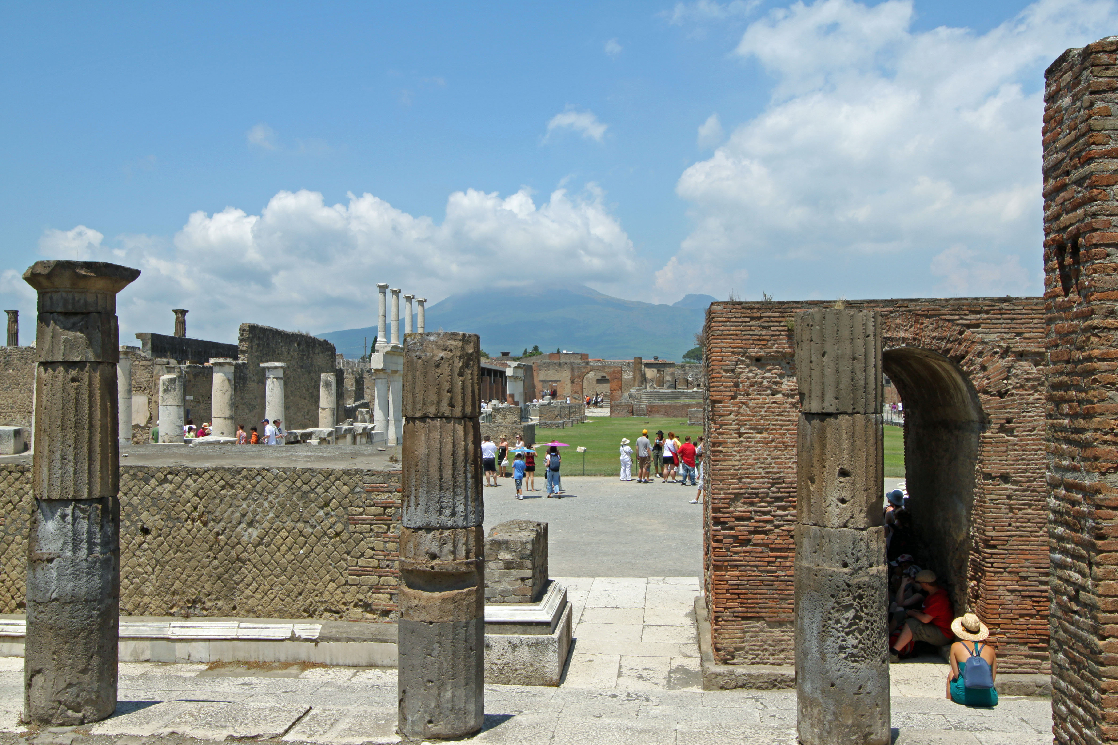 Pompei: Foro (sullo sfondo: il Vesuvio)